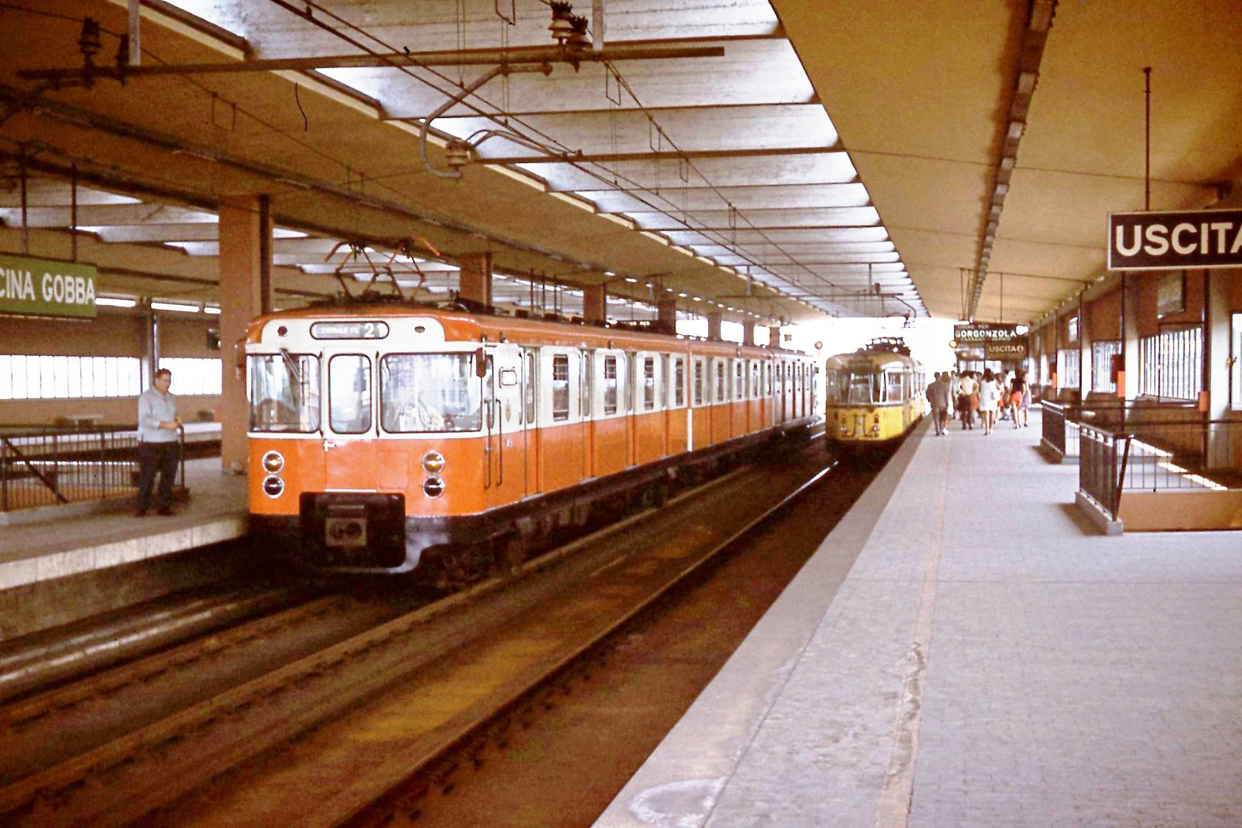 Stazione di Cascina Gobba delle linee celeri dell'Adda. A sinistra un treno della linea 1 della metropolitana, utilizzato provvisoriamente sulla linea 2, in attesa dell'arrivo dei nuovi treni appositamente progettati; a destra un convoglio tranviario interurbano bloccato, in servizio sulla tratta extraurbana per Gorgonzola e Vaprio.